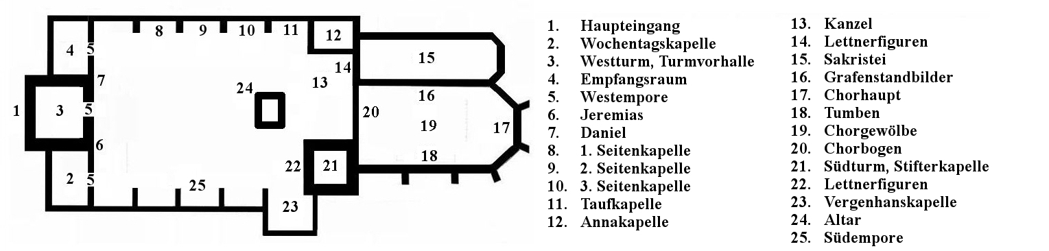 Grundriss der Stiftskirche Stuttgart mit Legende.